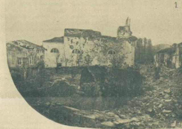 Razvaline cerkve v Mirnu